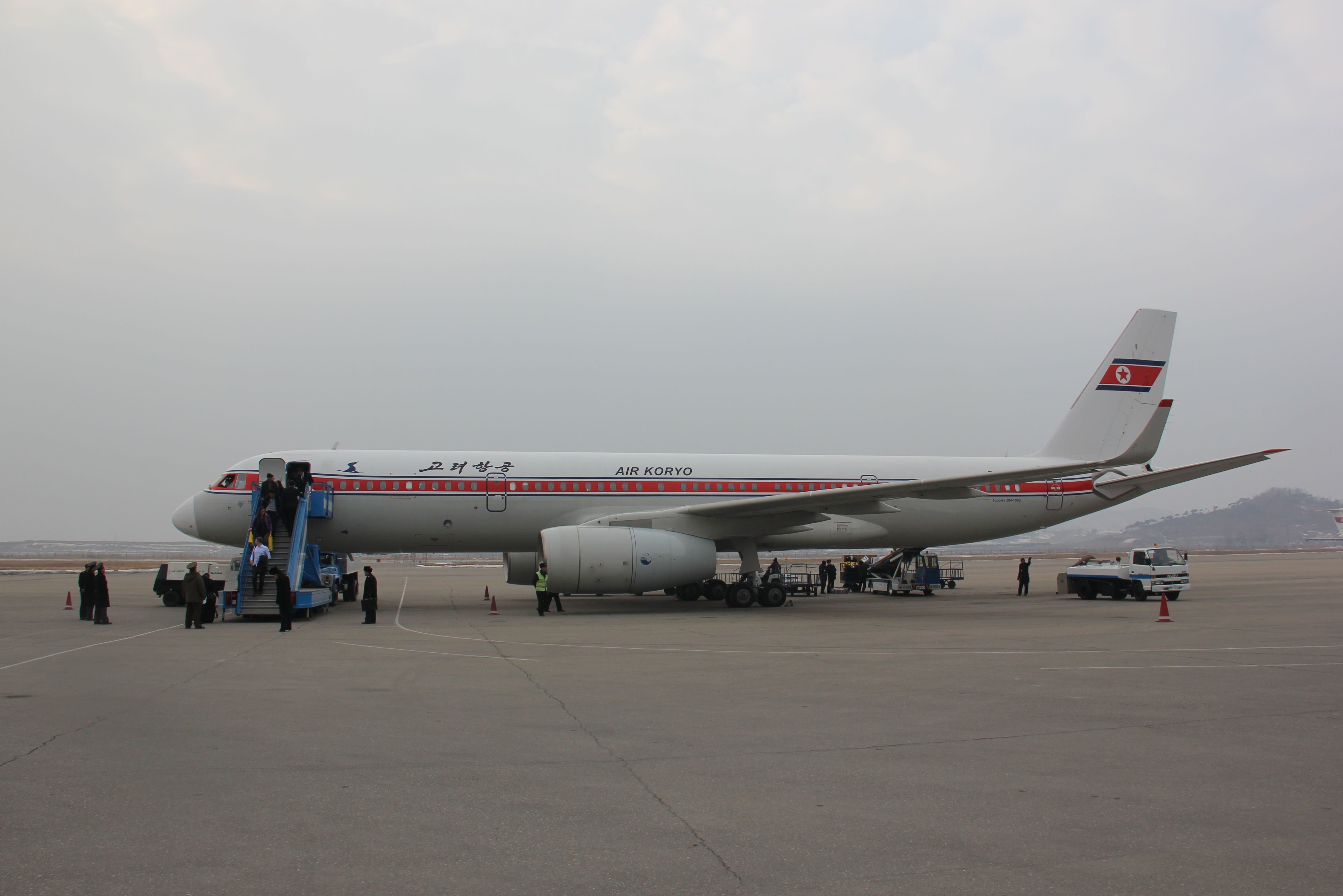 Pyongyang Airport